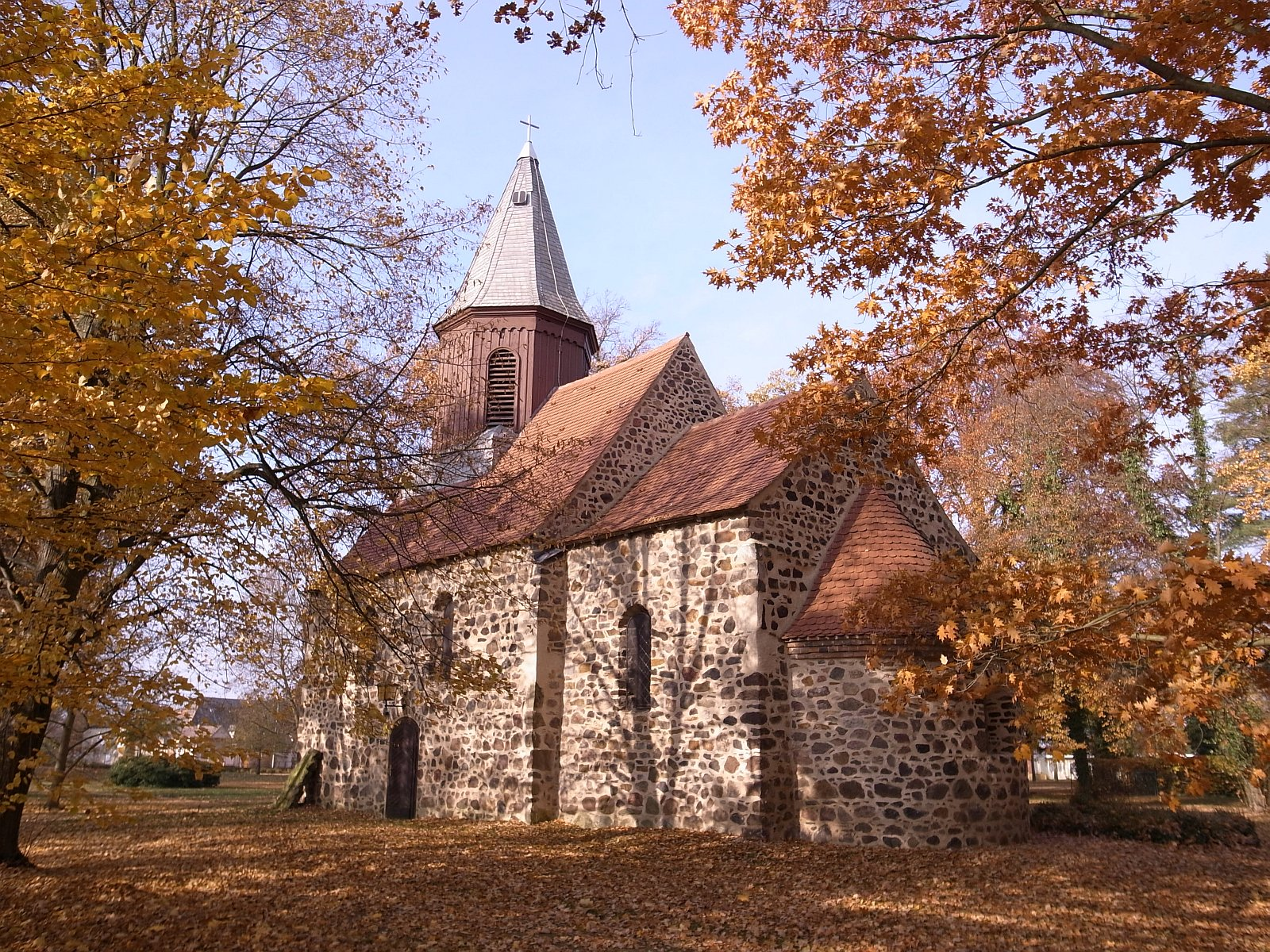 Altjeßnitz,Kirche im Gutspark